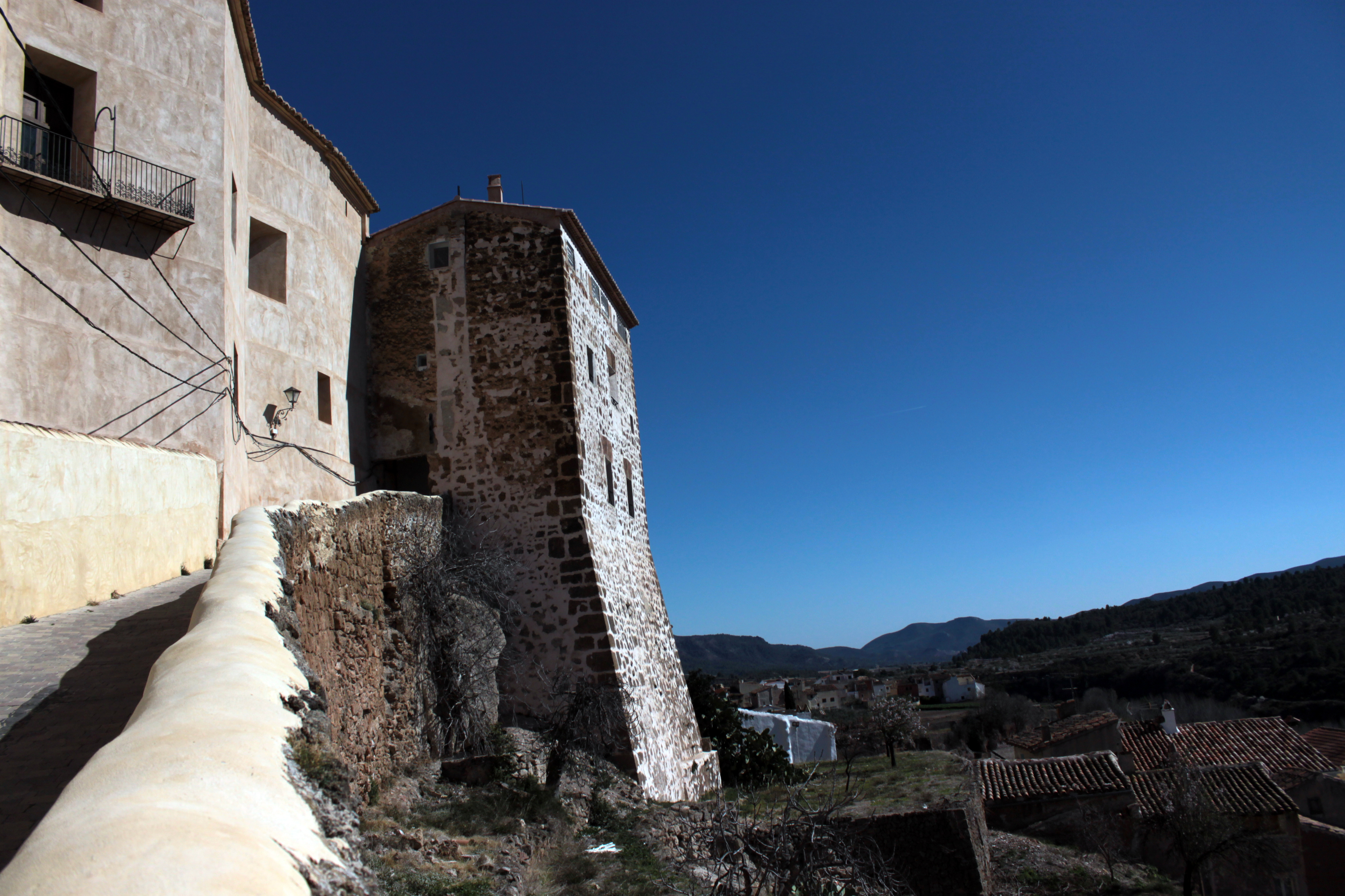 Restos del torreón del antiguo castillo en los muros del Palacio Vizcondal de Chelva, provincia de Valencia, Comunidad valenciana, España.